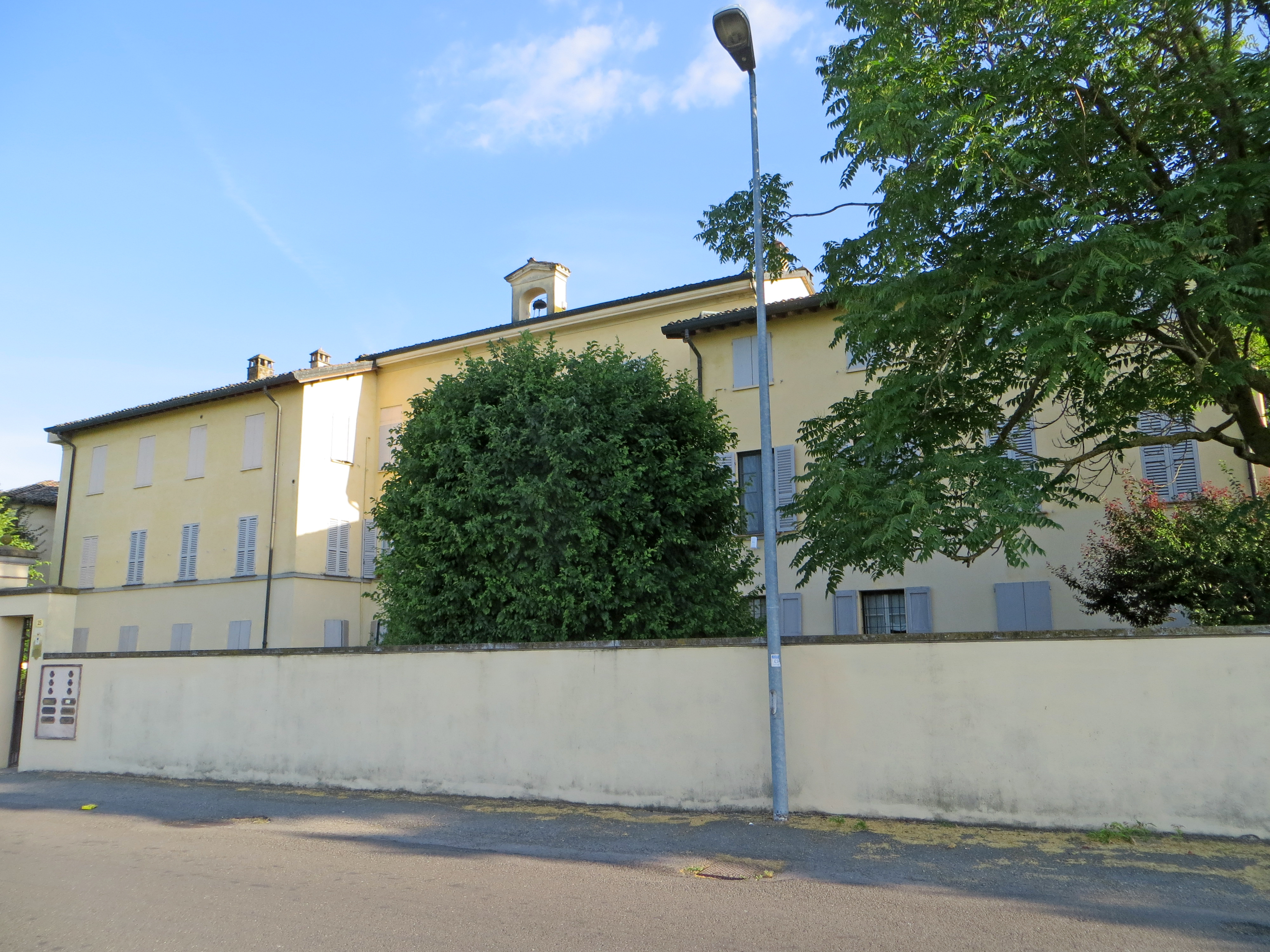 Villa Petitot (Marore, Parma) - facciata